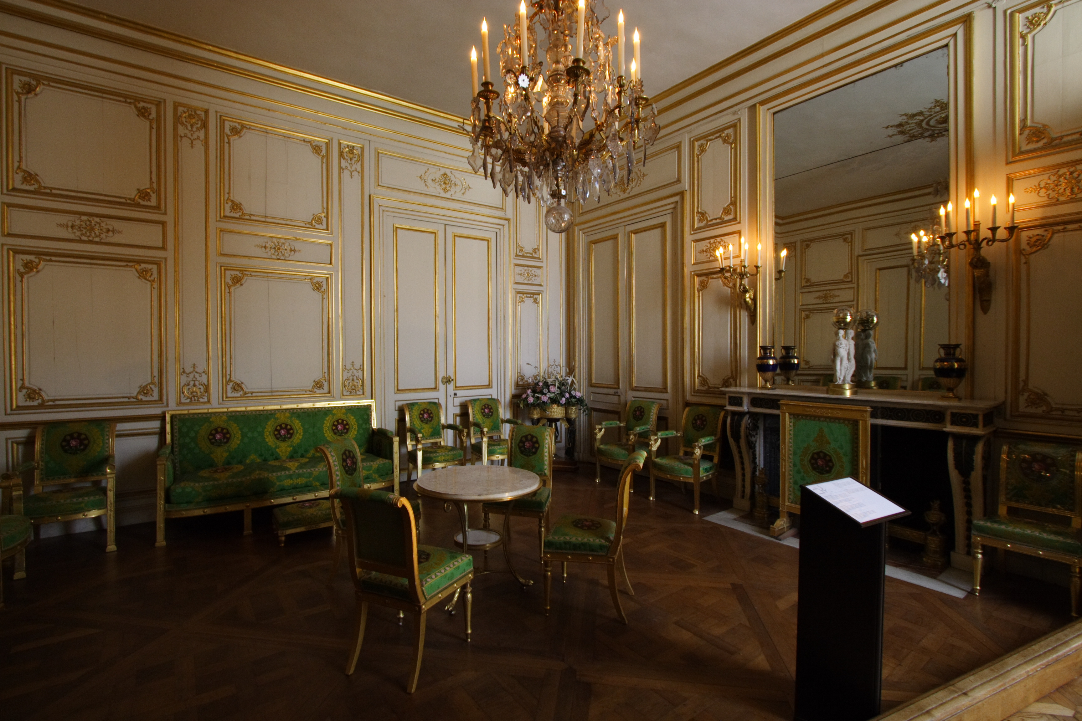 Der Weiße Salon im Schloss Fontainebleau